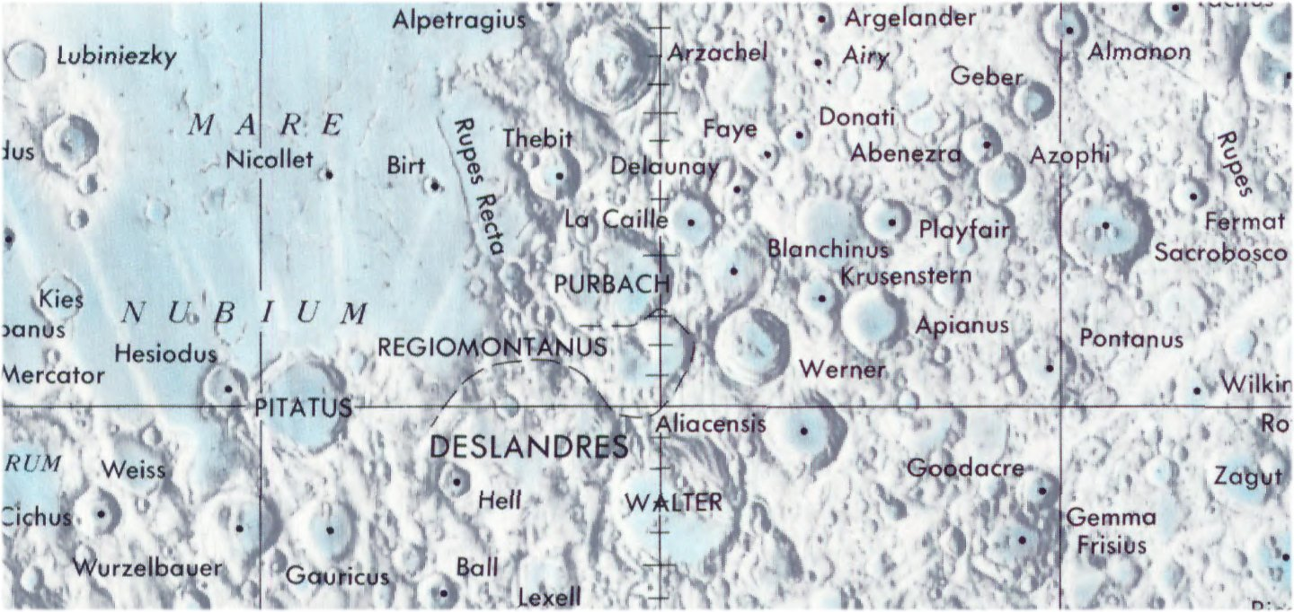 Cráter lunar Purbach. Localización. (Lunar Chart LPC1. Second Edition)